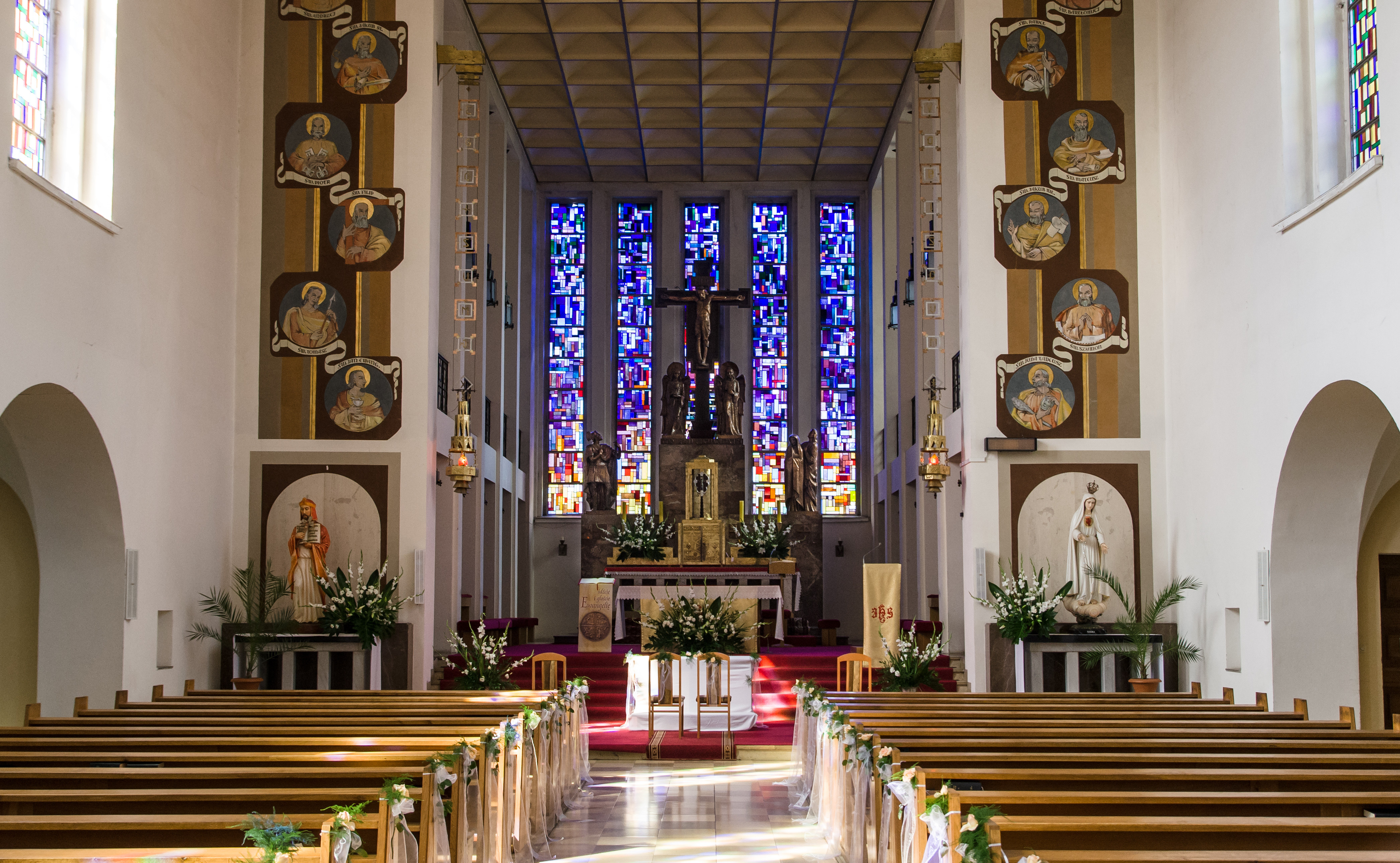 Klasztor Werbistów w Pieniężnie.